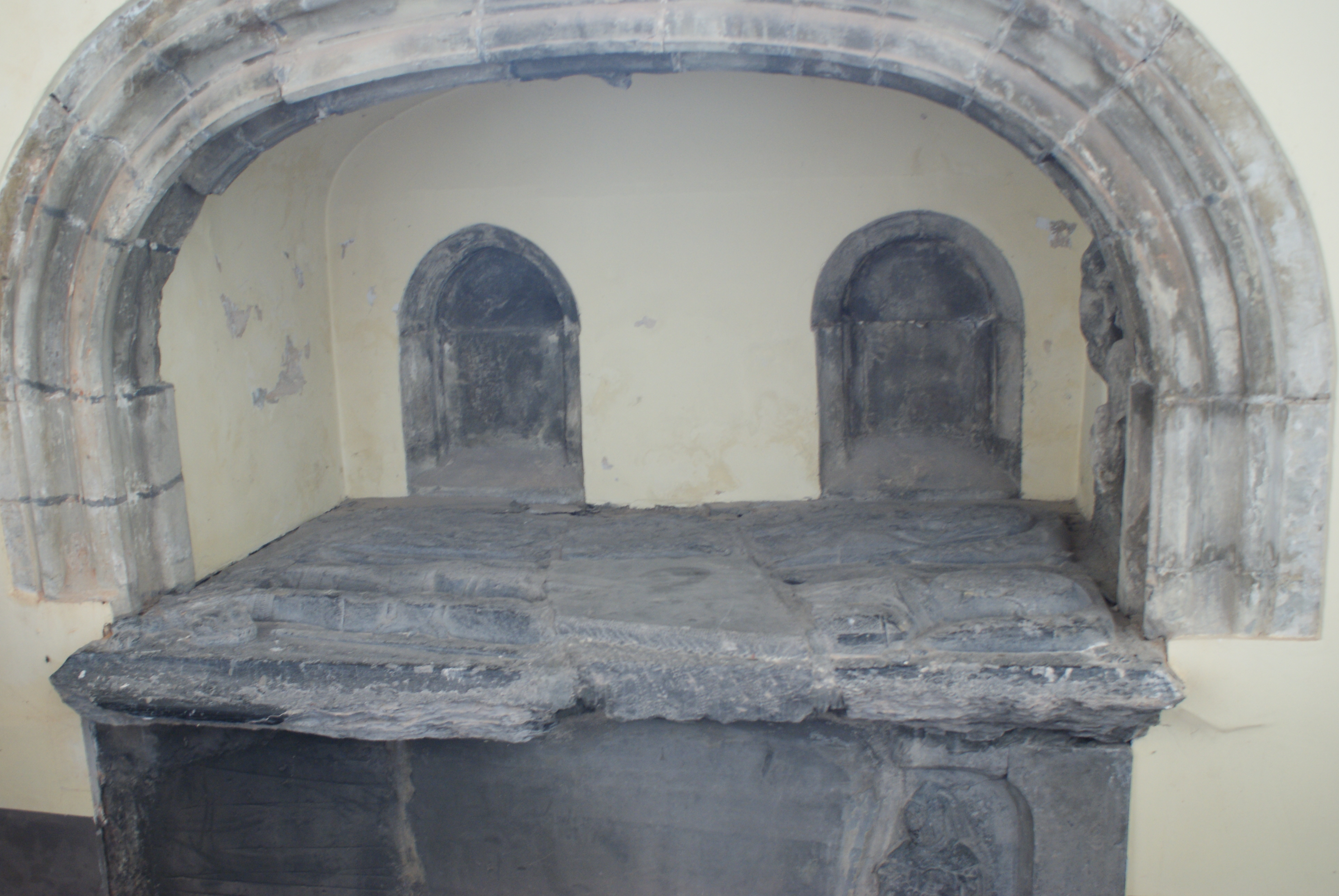 Praalgraf van Ridder Hervé de Meriadech (+1478) en z'n vrouw Jeanne de Croix (+1460) in de Sint-Medarduskerk (Wervik) van Wervik. Het graf werd zwaar beschadigd in 1914, toen duitse soldaten het met springstof openden, op zoek naar waardevolle voorwerpen.